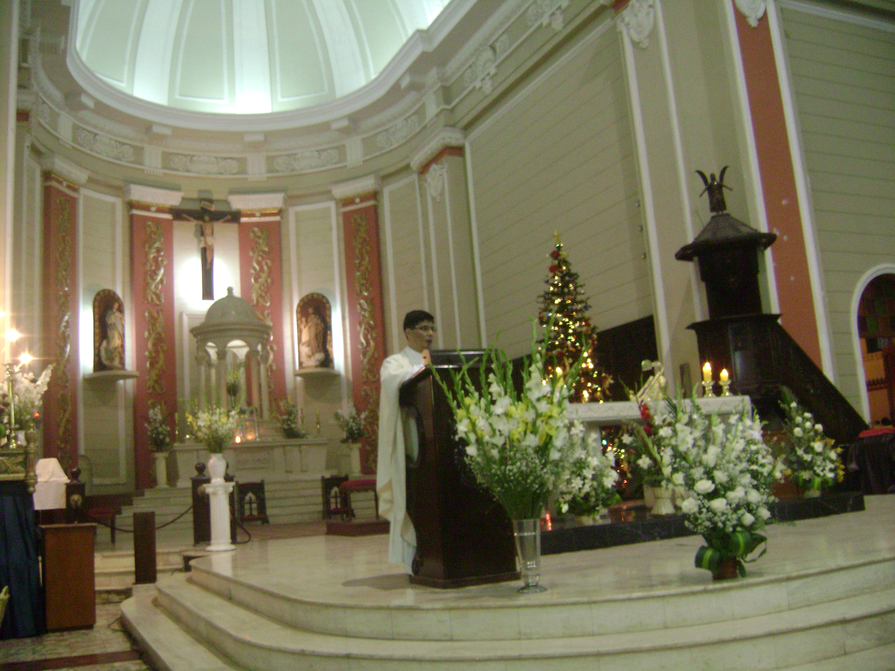 Altar de la Catedral de Chiclayo